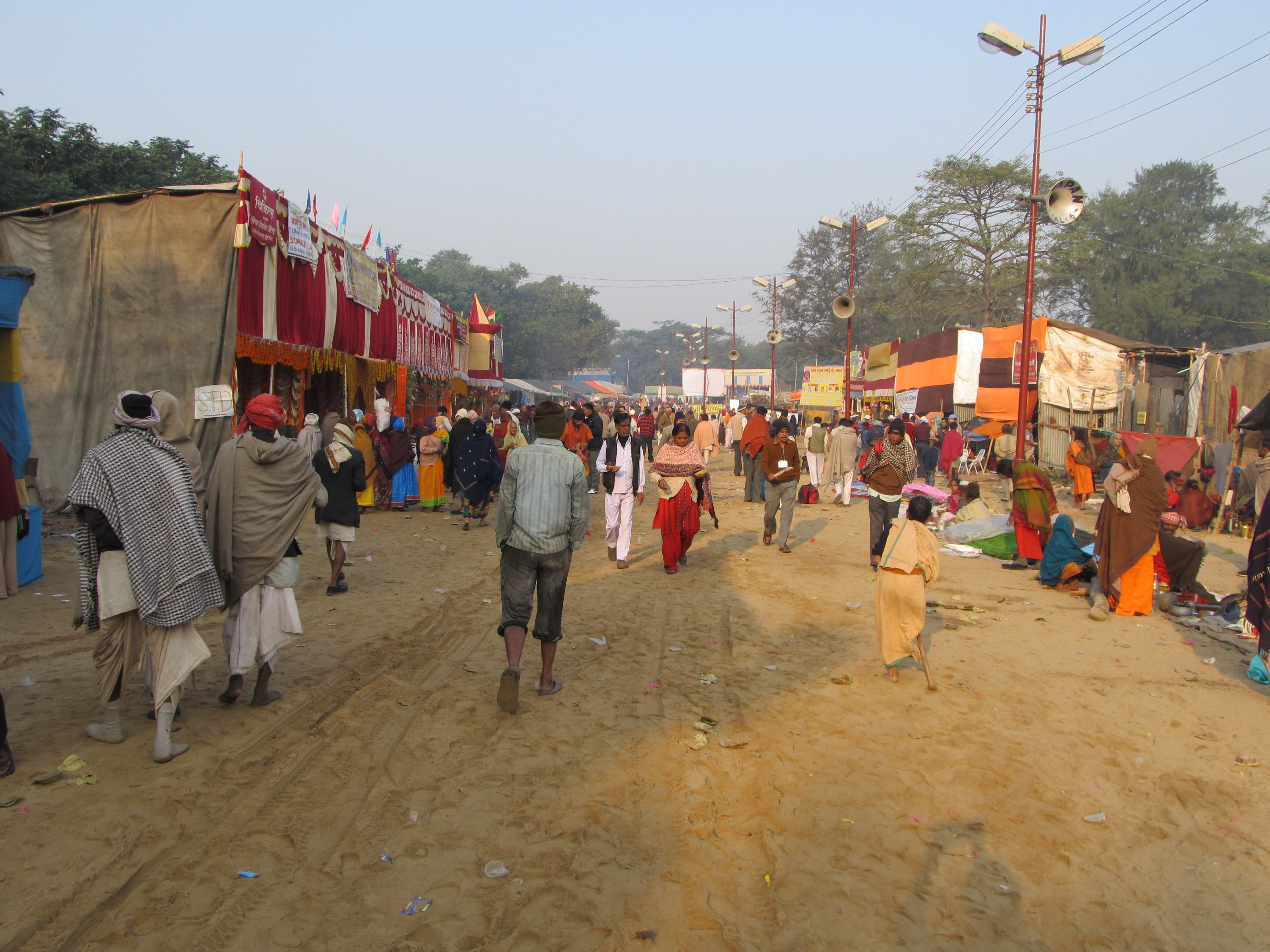 Photographed at Kolkata.